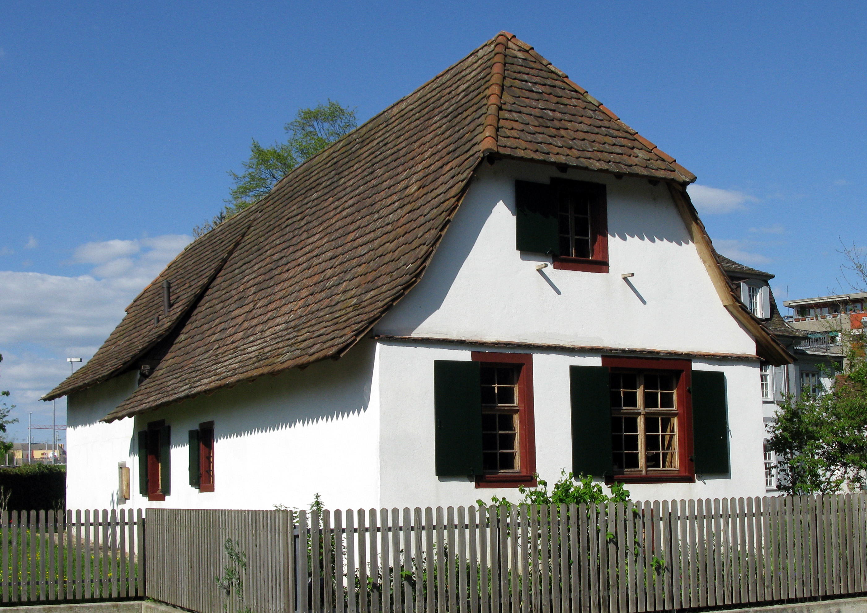 Fischerhaus Bürgin in Basel-Kleinhüningen